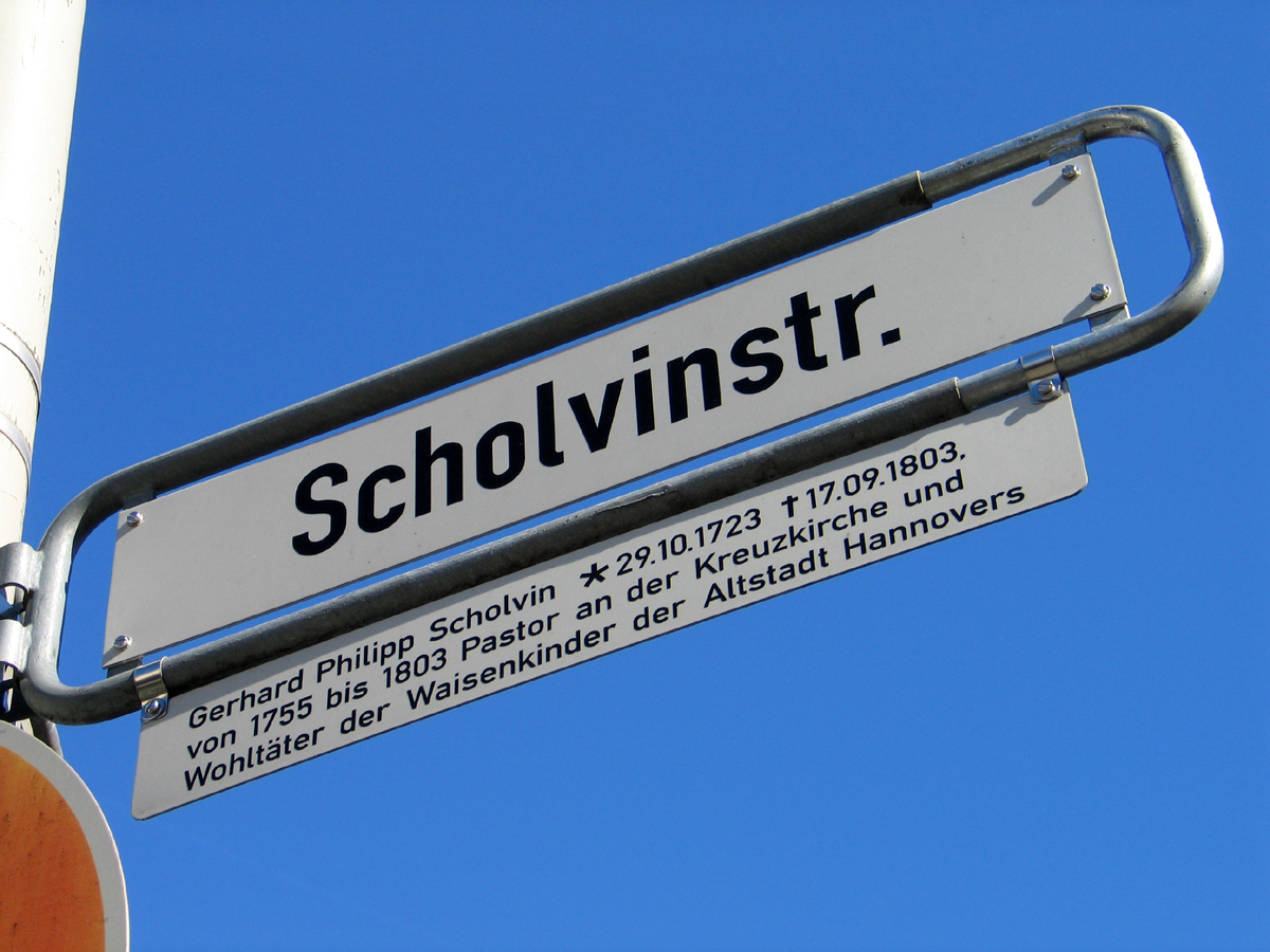 Die Legende unter dem Straßenschild der Scholvinstraße Ecke Göthestraße erläutert: „Gerhard Philipp Scholvin * 20.10.1723 † 17.09.1803, von 1755 bis 1803 Pastor an der Kreuzkirche und Wohltäter für die Waisenkinder Hannovers“ ...